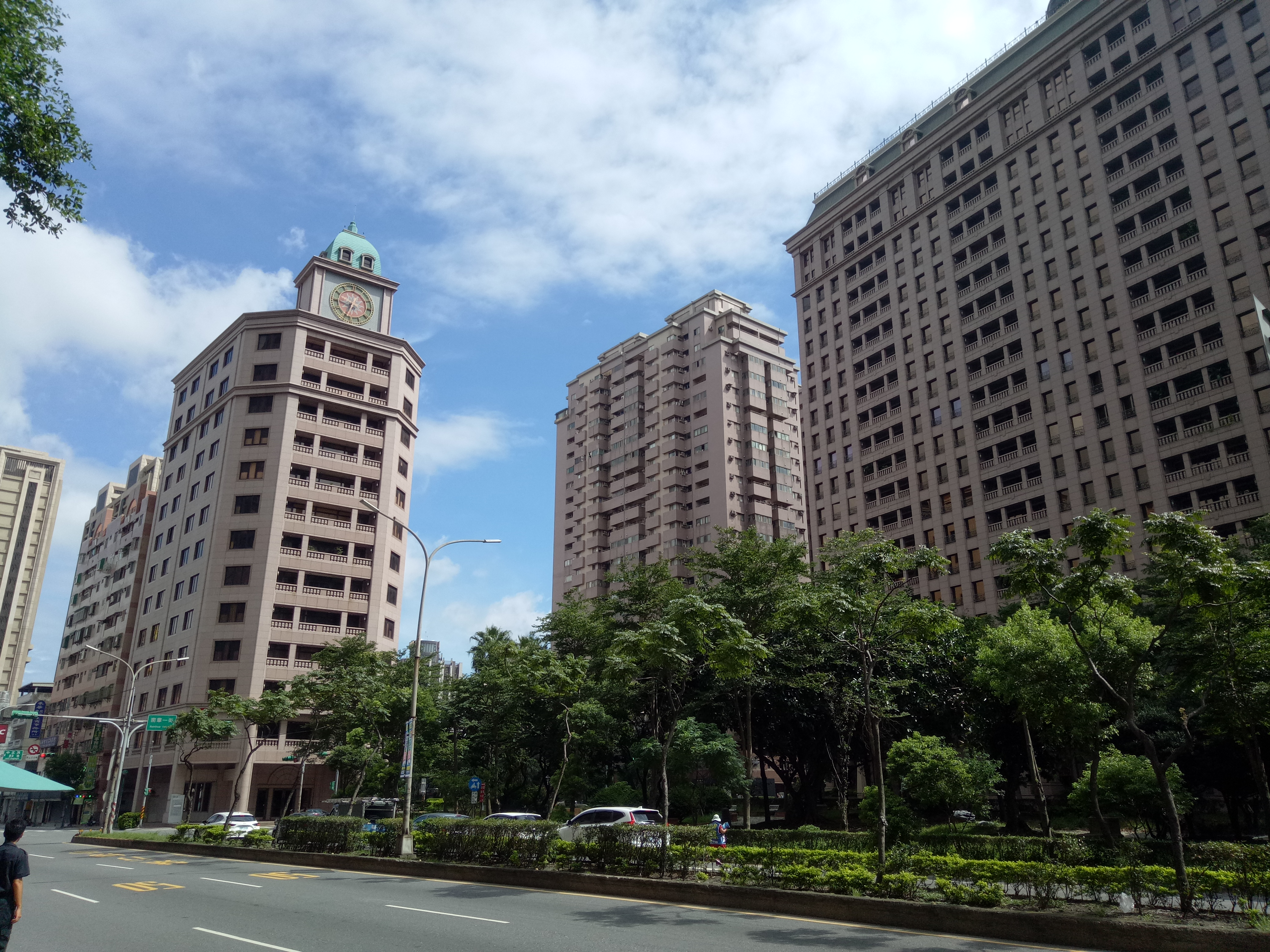 桃園蘆竹區南崁地區街景。